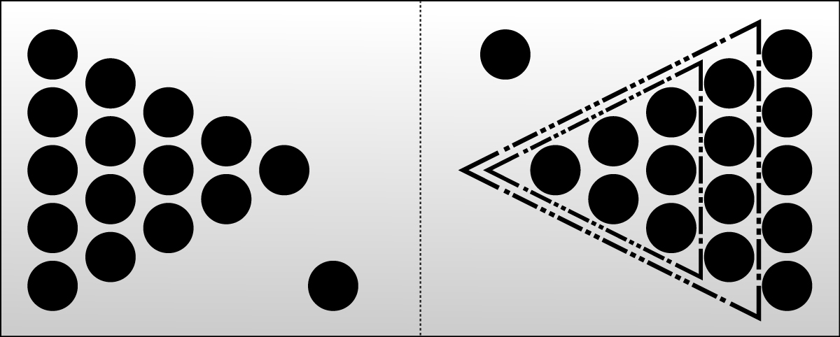 Die Grundaufstellung einer Beer Pong Spielfläche mit 6, 10 oder 15 Bechern je Seite.